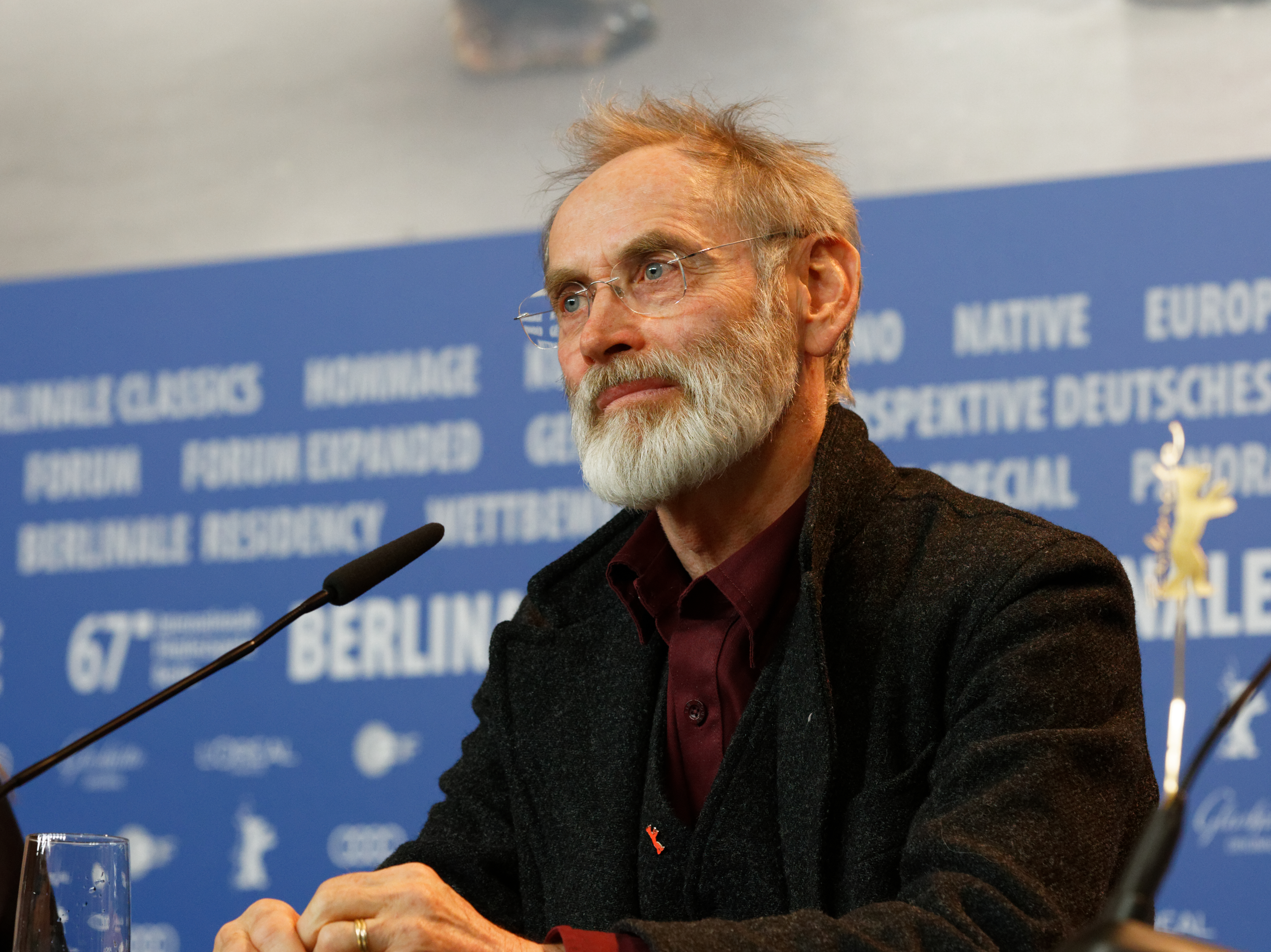 Christopher Sheppard bei der Pressekonferenz zu The Party bei der Berlinale 2017